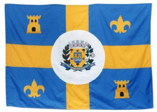 Bandeira do Município de Guararapes - SP